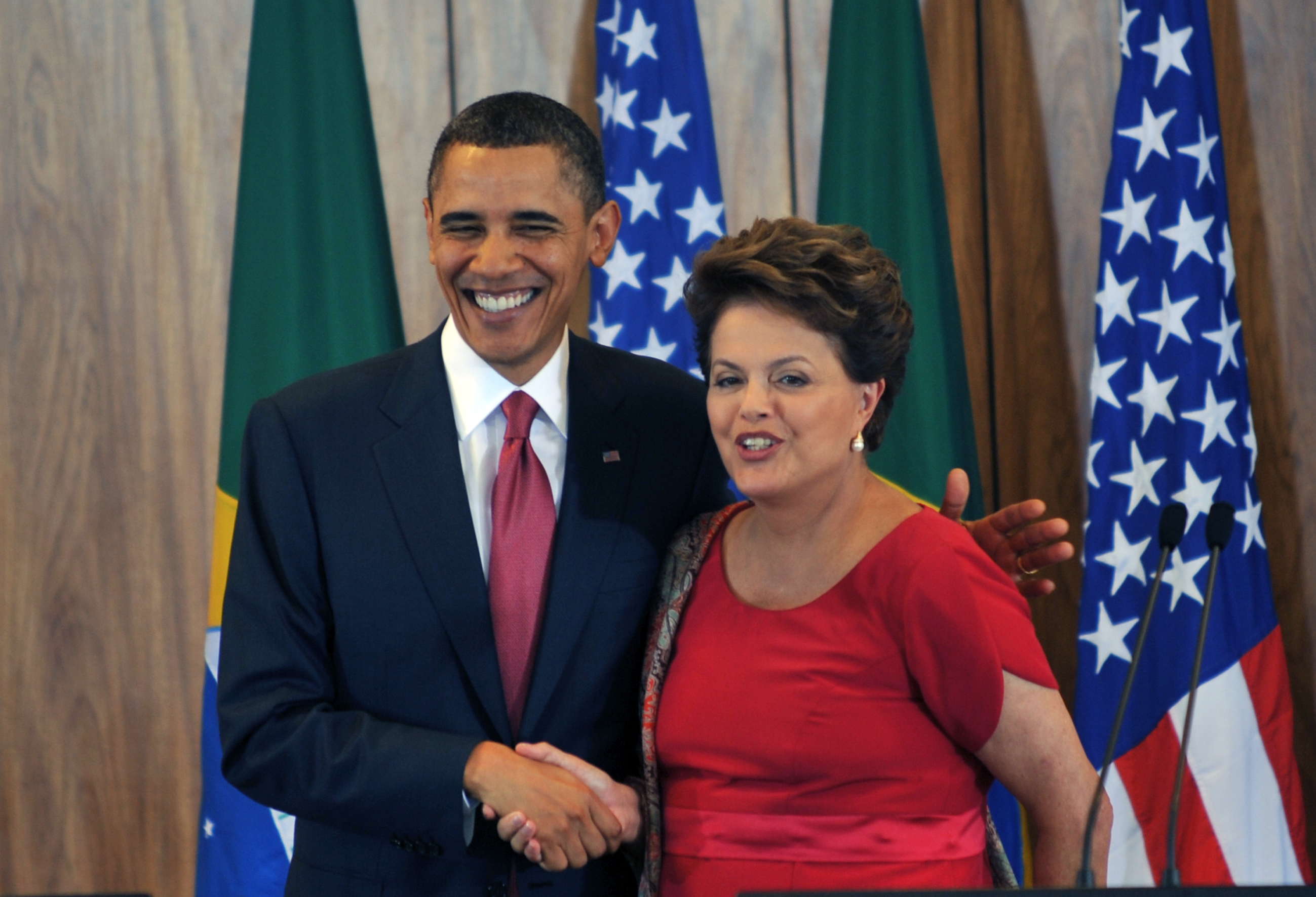 O presidente dos Estados Unidos, Barack Obama, e a presidente do Brasil, Dilma Rousseff, durante declaração conjunta, no Palácio do Planalto. Brasília, 19 de março de 2011.